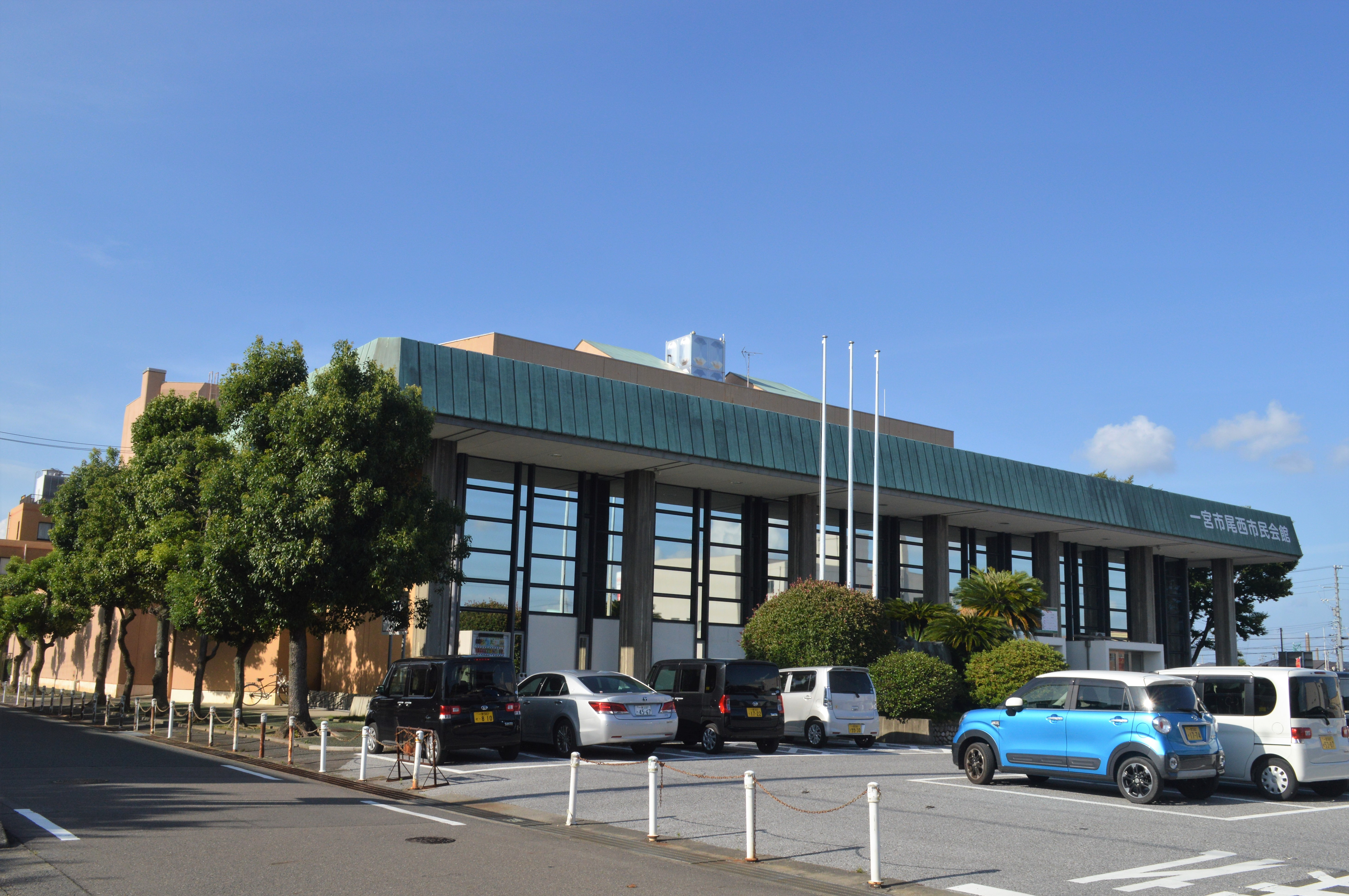 愛知県一宮市にある一宮市尾西市民会館。1970年に尾西市の尾西市民会館として開館した。